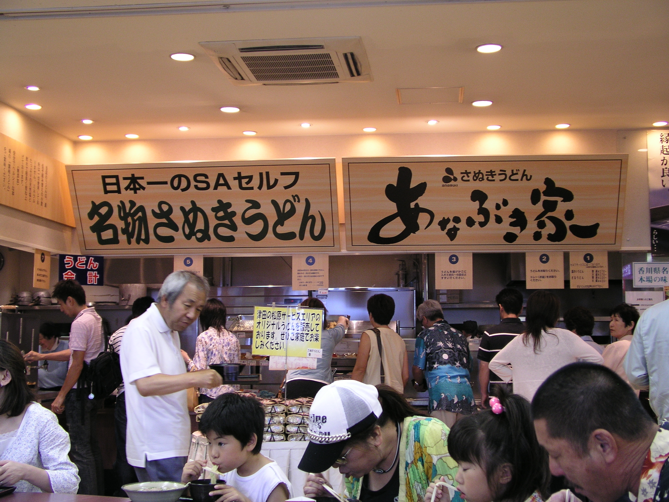 こんなところですが、美味でした